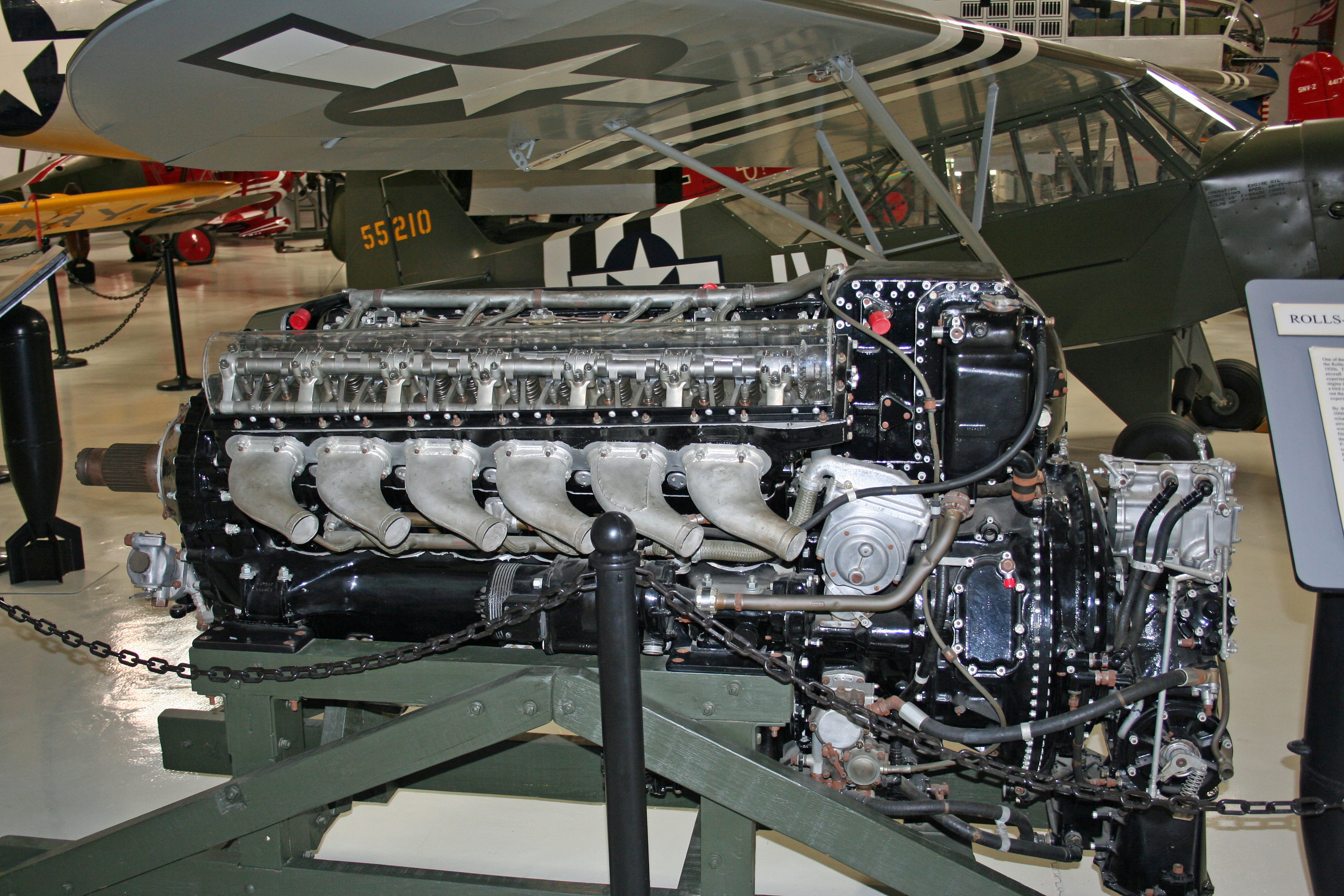 Rolls-Royce Merlin 63 V-12 engine